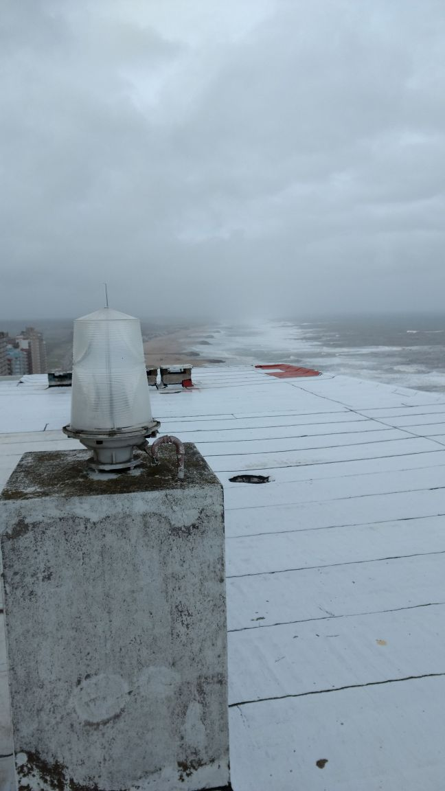 Luz de ayuda de navegación